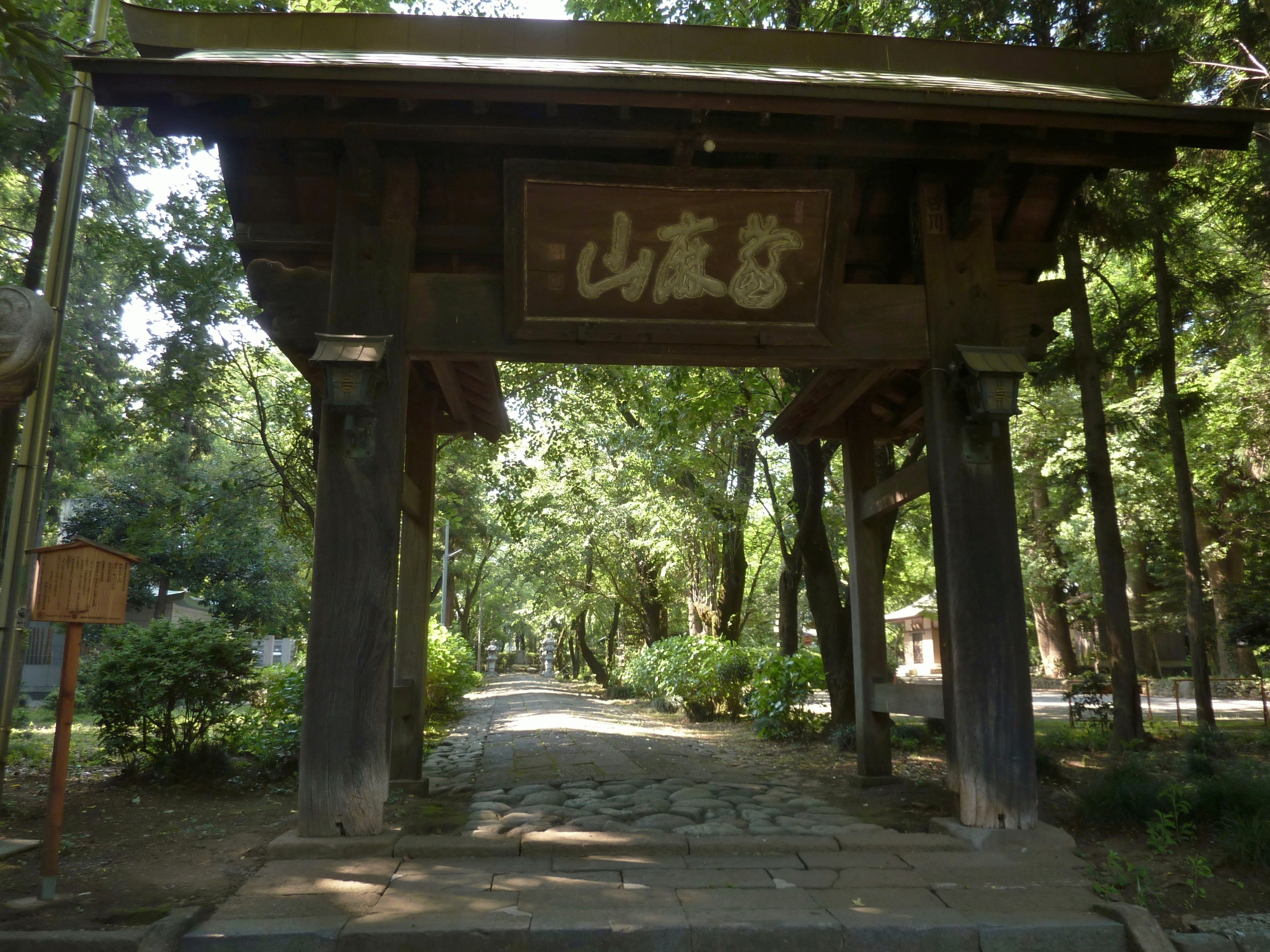 神奈川県相模原市・無量光寺の山門（市指定有形文化財）